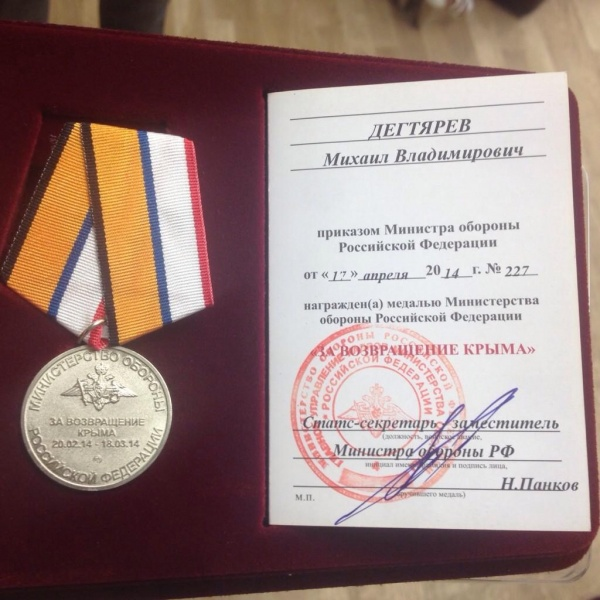 Medal of the Ministry of Defence of the Russian Federation "For the return of the Crimea"